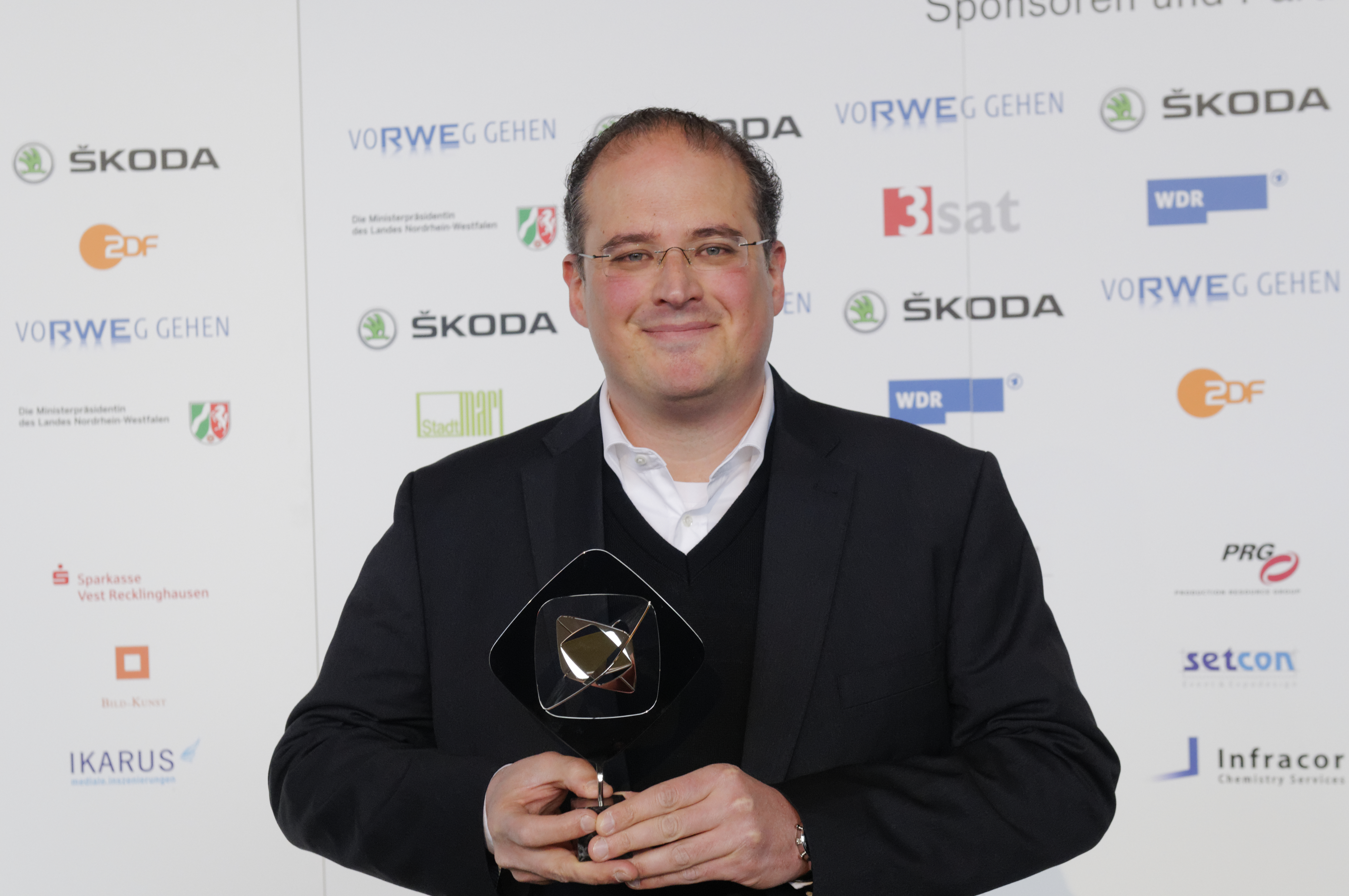 Grimme-Preis 2013 Pressekonferenz und Preisverleihung